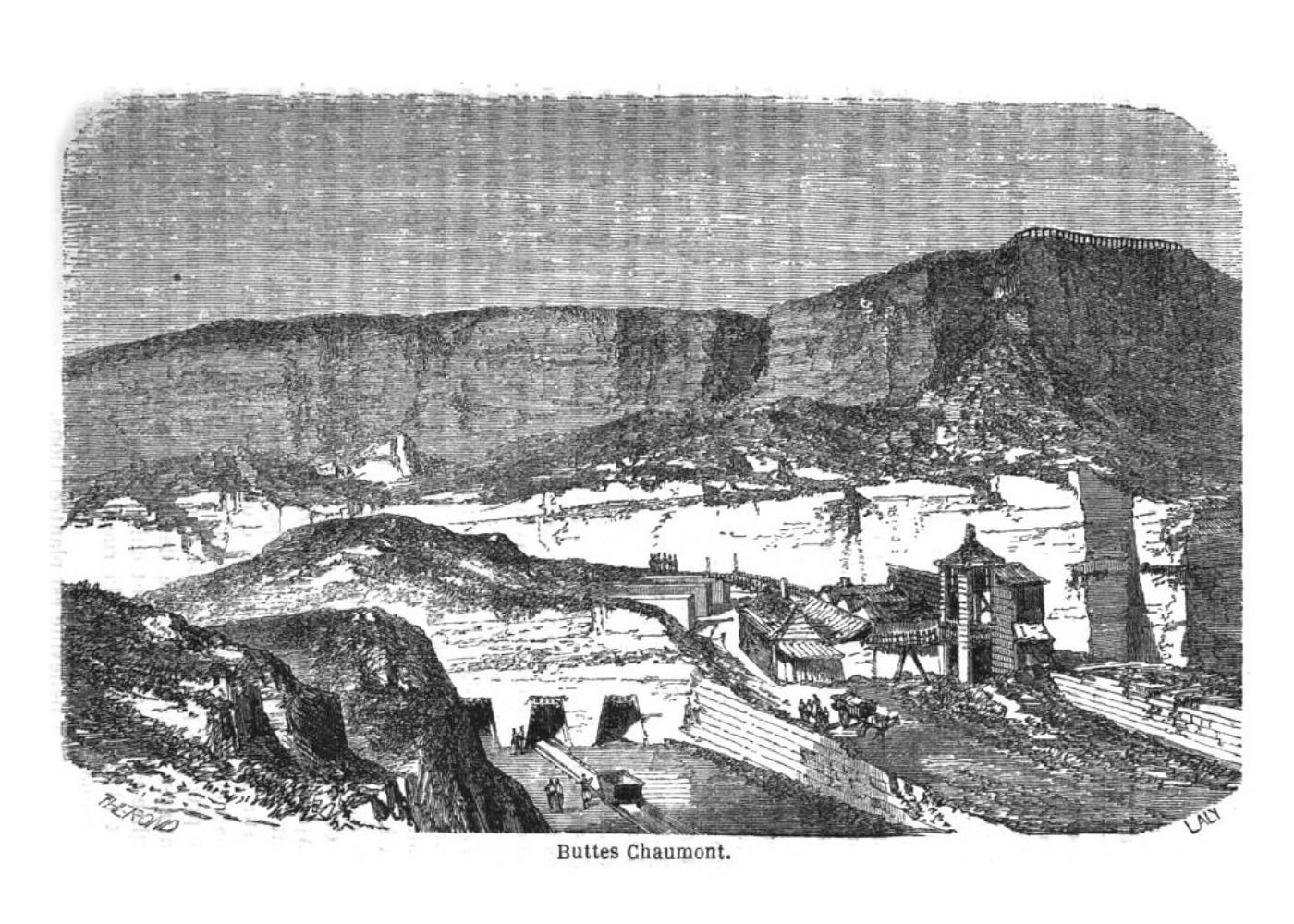 Buttes Chaumont. Stich von Laly Thérond, Paris illustré: nouveau guide de l'étranger et du Parisien, 1863.